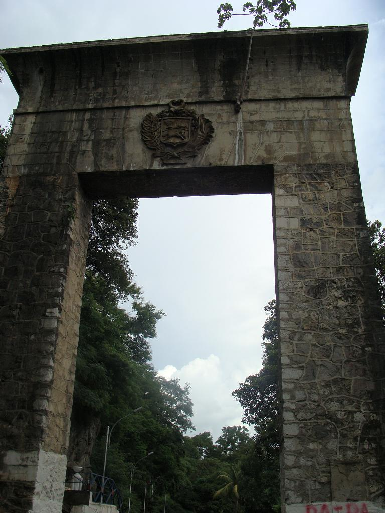 Un yagrumo (Cecropia peltata) crece en una pared del monumento histórico de las Batallas de La Puerta en Venezuela. Puede verse la acción disolvente de las raíces con el carbonato cálcico del cemento y de las piedras del monumento.